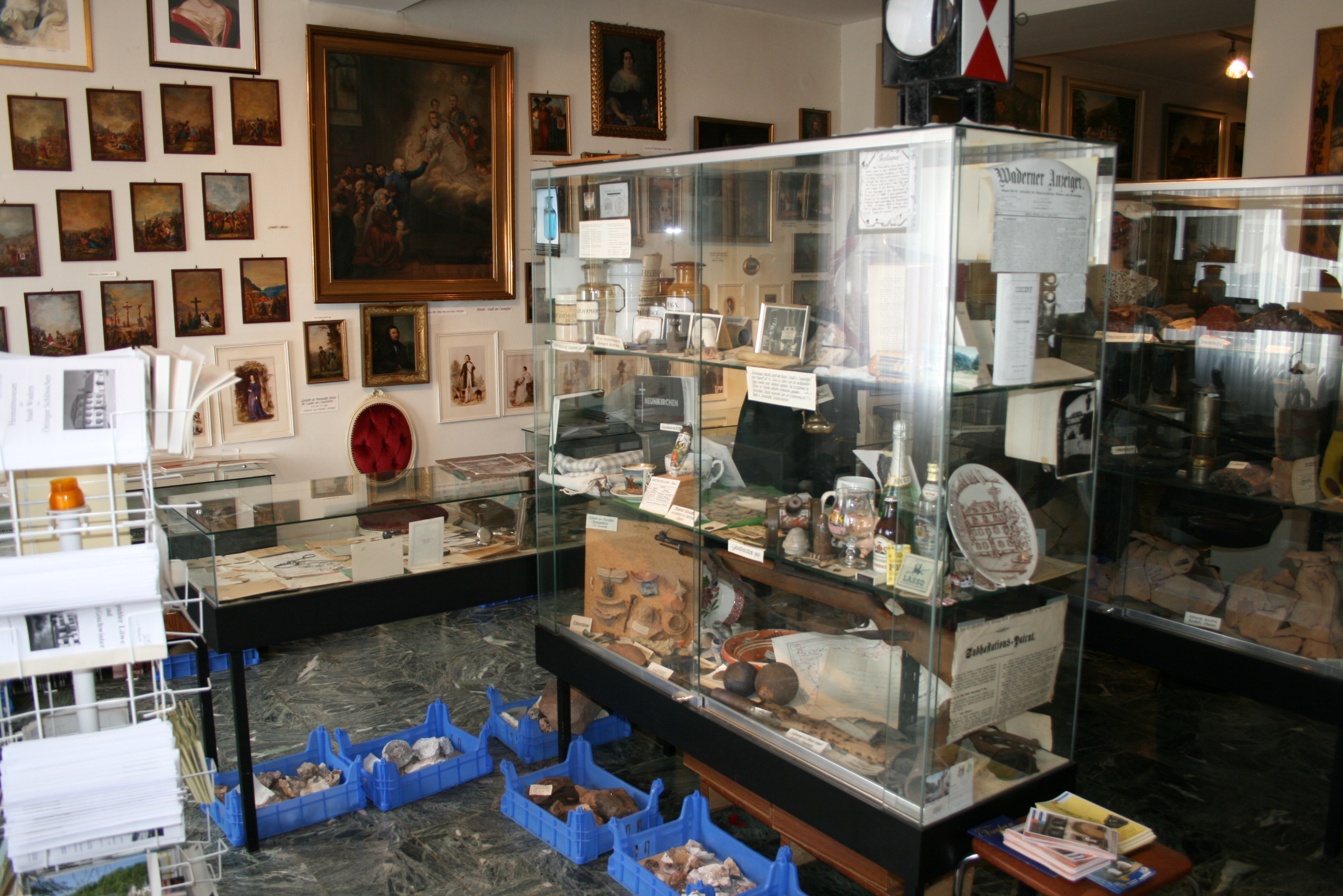 Zu Willy Weinens Zeiten als Leiter waren sämtliche Exponate mehr oder weniger ungeordnete im Raum verteilt